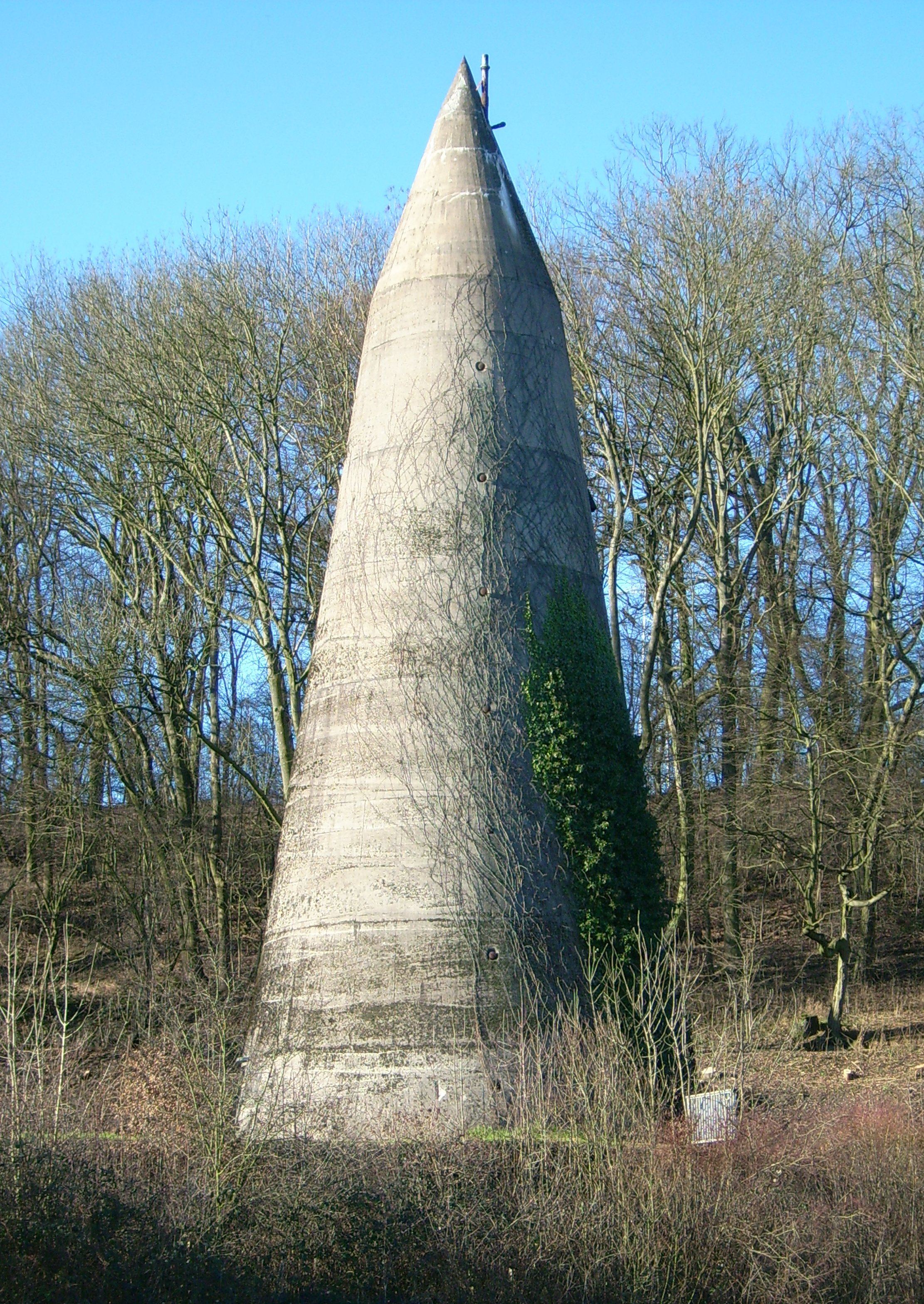 Hochbunker in Neunkirchen (Saar)